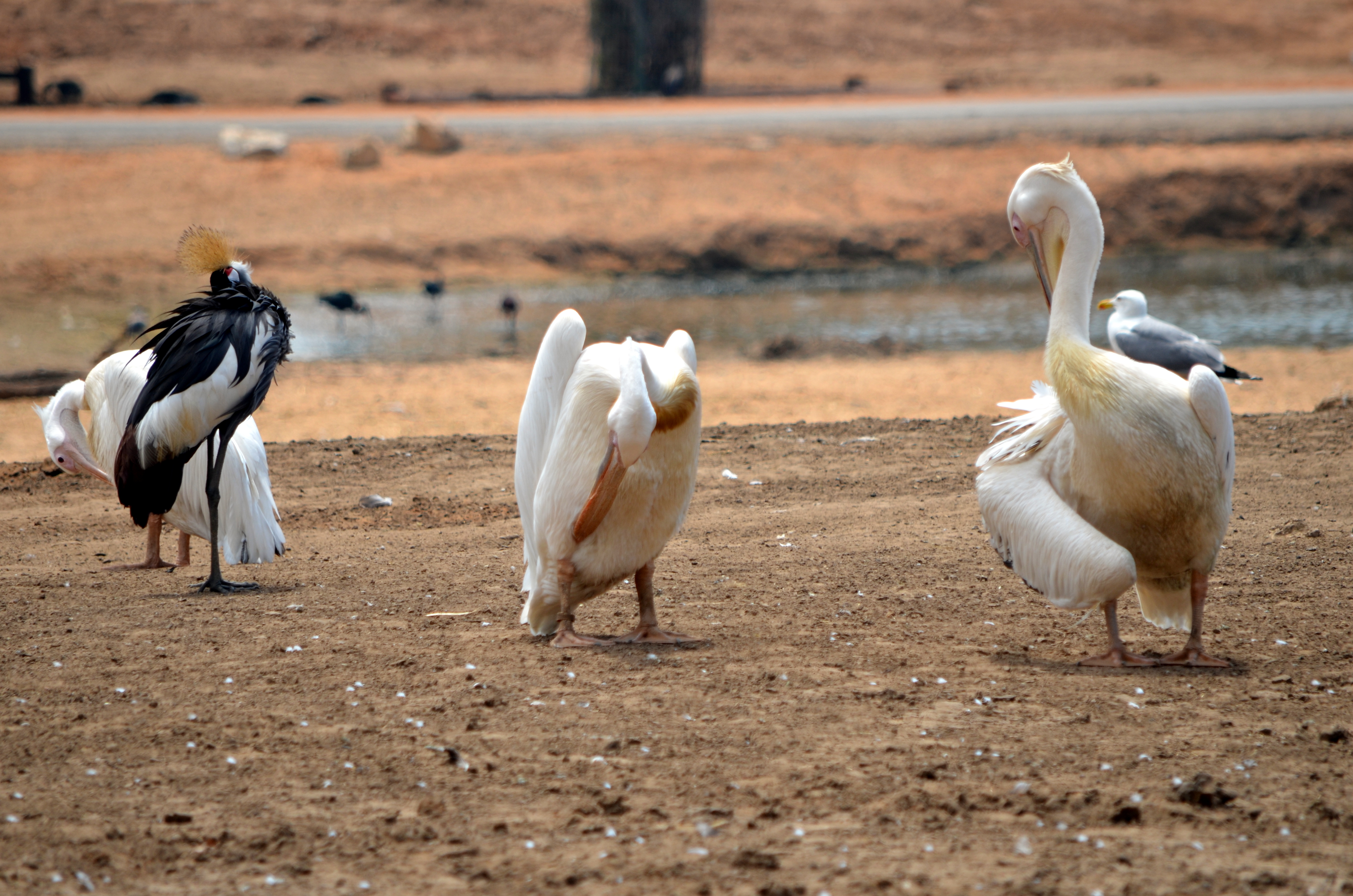 Ramat Gan, Israel